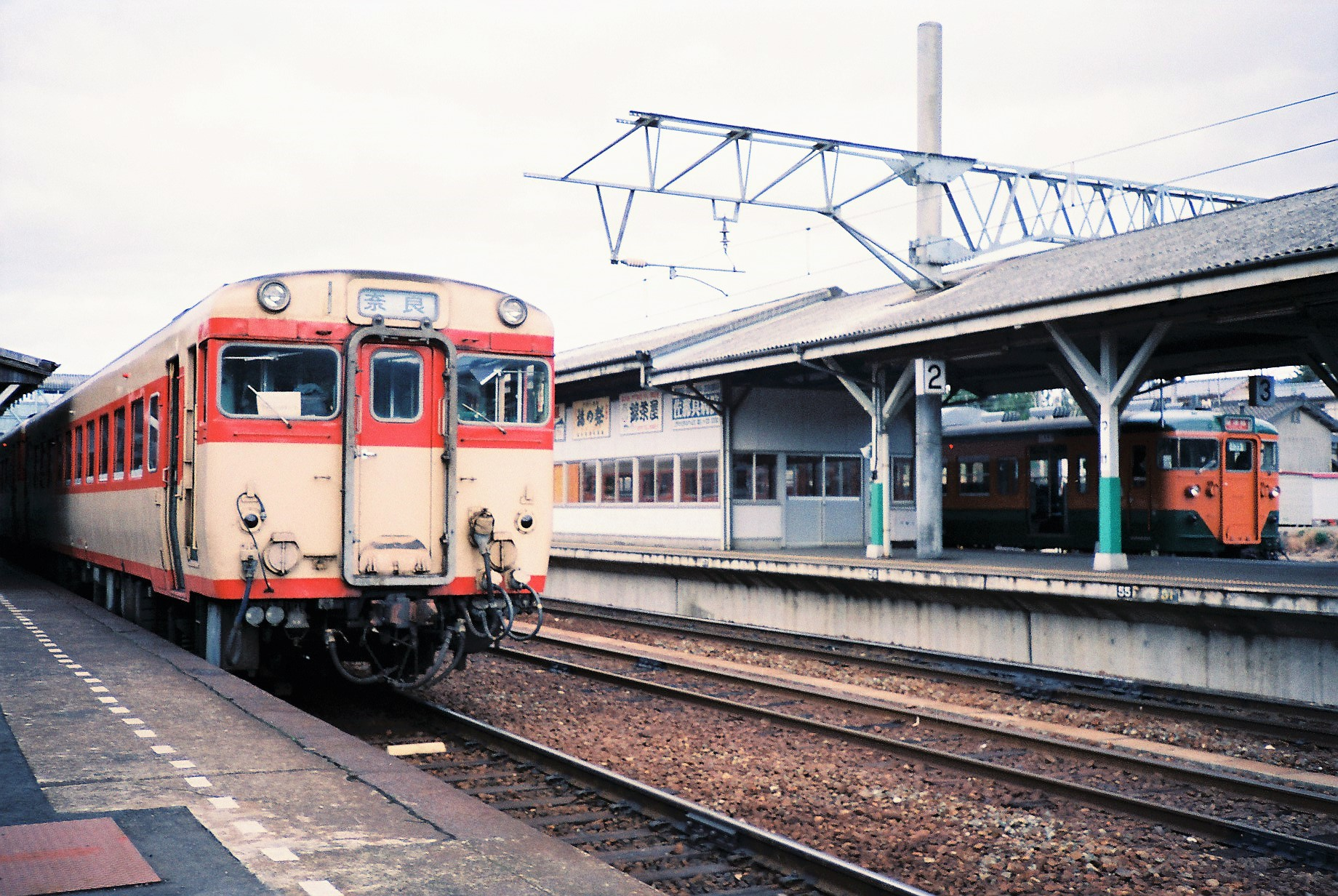 柘植駅に停車中の関西本線（左・1番線）と草津線（右・3番線）列車（1987年1月撮影）